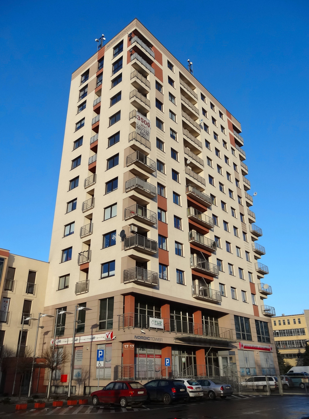 Nordic Tower w Bydgoszczy, dawny biurowiec Zakładów Przemysłu Okrętowego "Famor" (zbud. lata 70. XX w.), przebudowany na mieszkania w 2010 r.